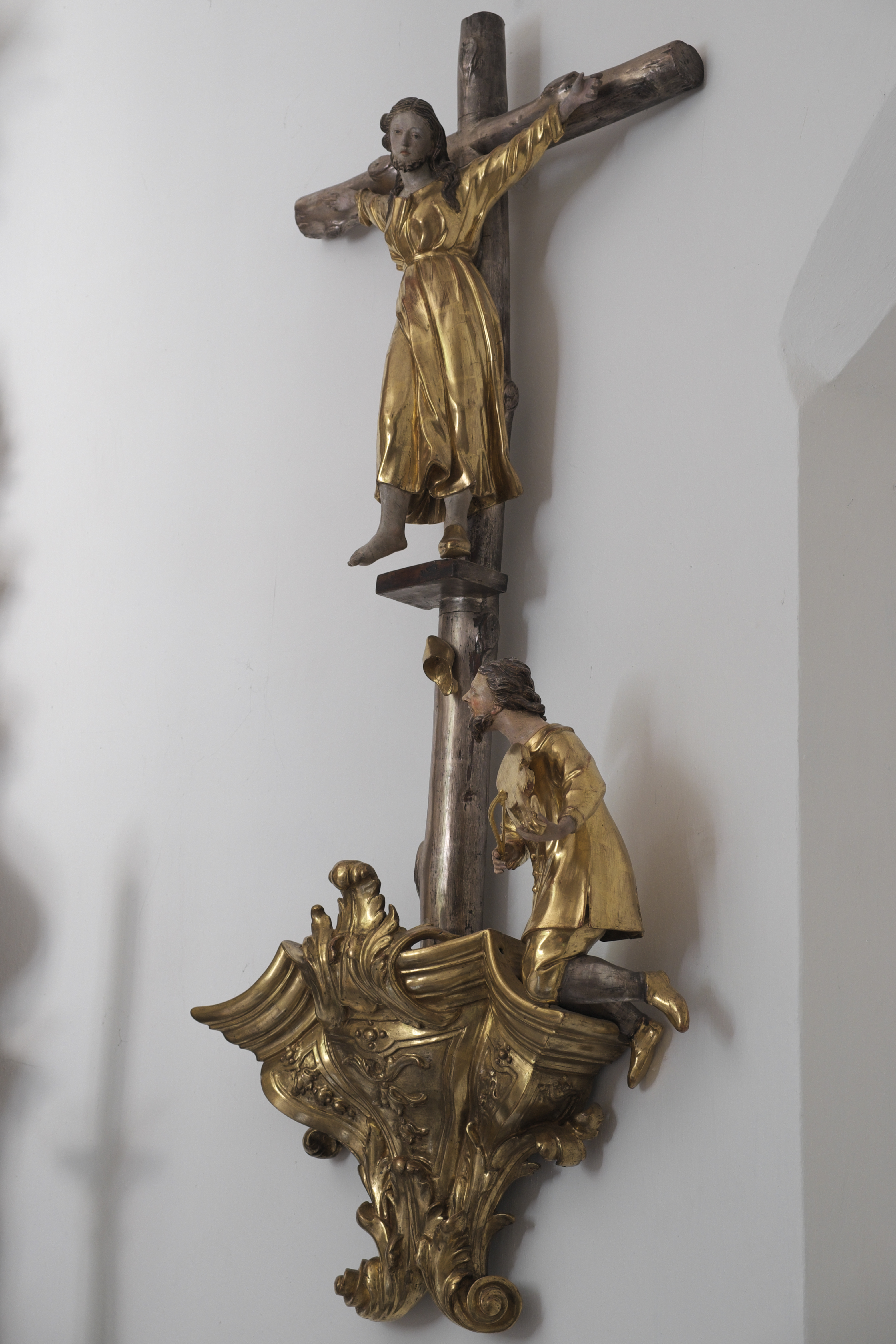 Gnadenkapelle des Augustinerklosters Maria Eich in Planegg im Landkreis München (Bayern, Deutschland), Darstellung der heiligen Wilgefortis.